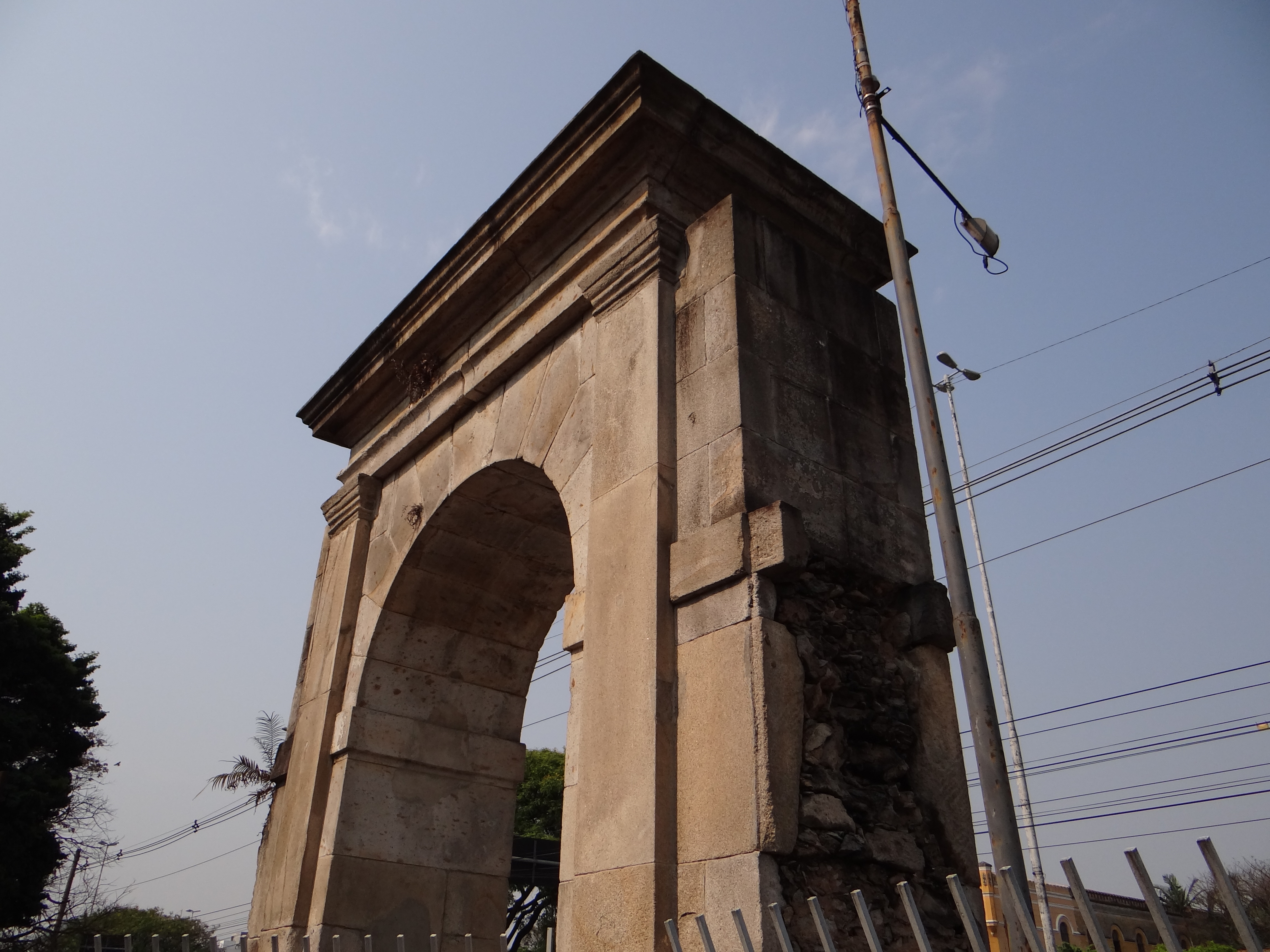 Marcas dos muros demolidos nas paredes do portal do antigo Presídio Tiradentes, localizado no bairro do Bom Retiro, São Paulo (SP), Brasil.